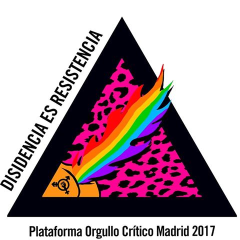 Logo de la Plataforma Orgullo Crítico Madrid 2017